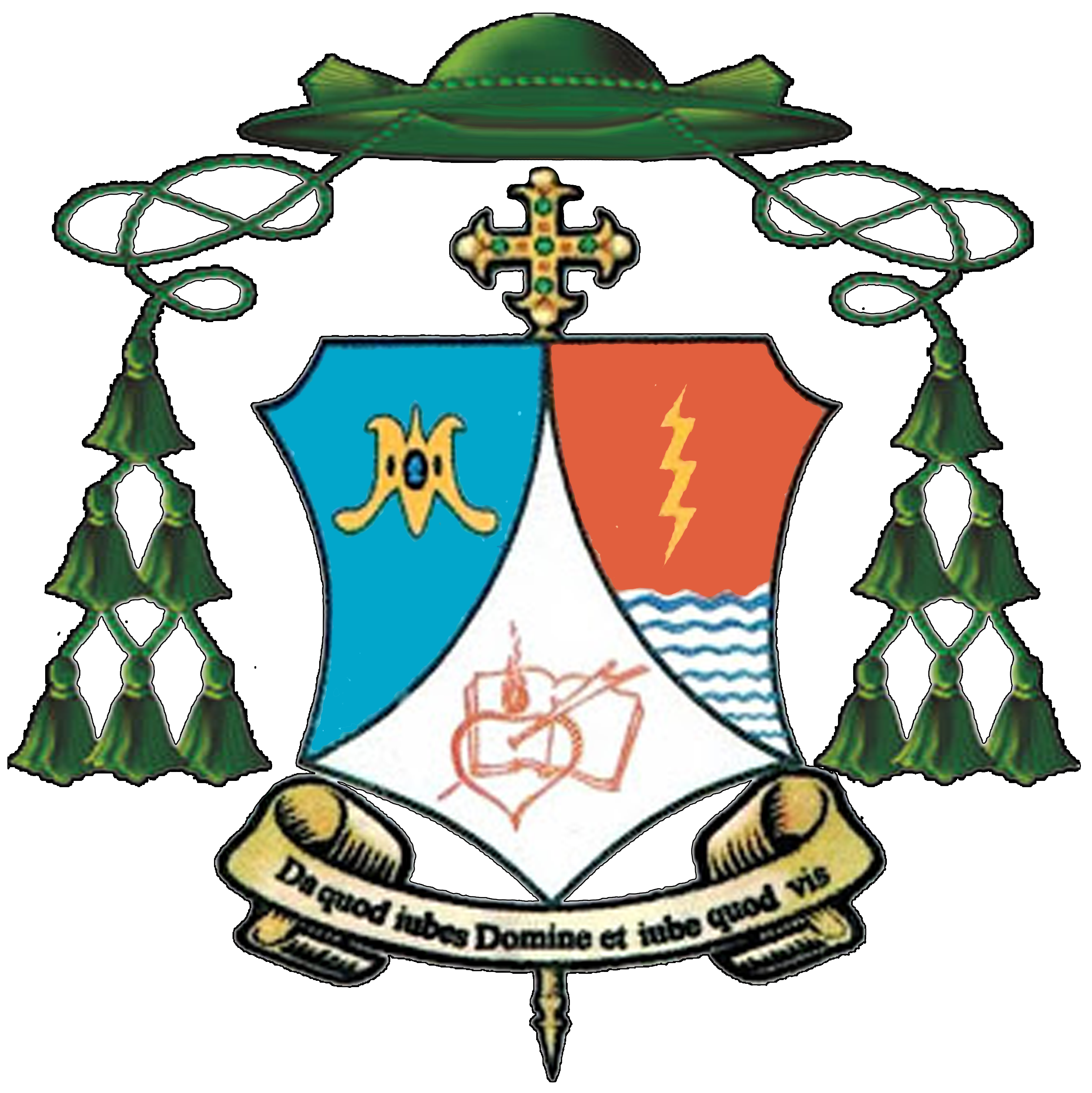 Escudo Episcopal de Monseñor Helizandro Terán Obispo de Ciudad Guayana de Venezuela.